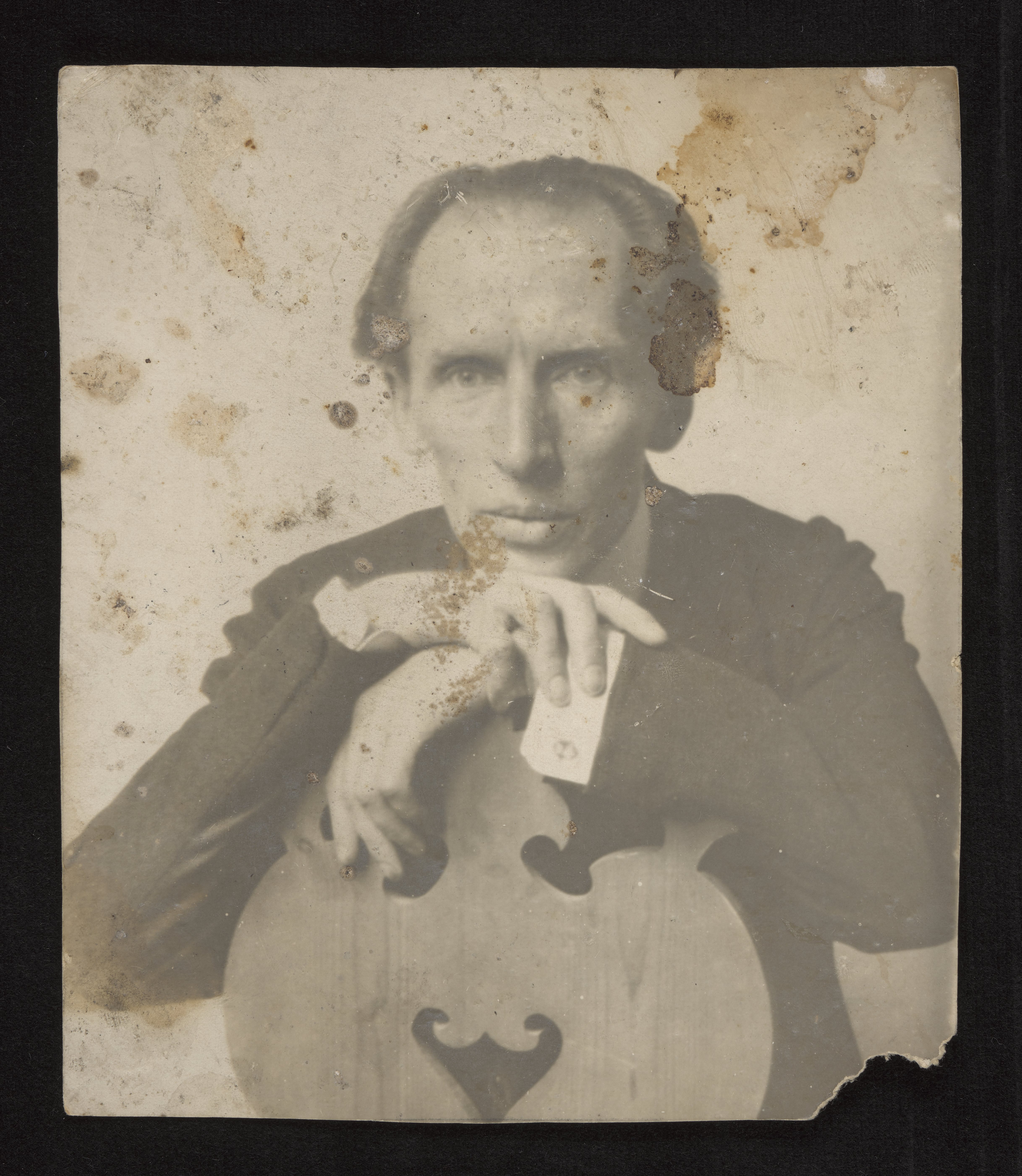 Olgierd Sokołowski